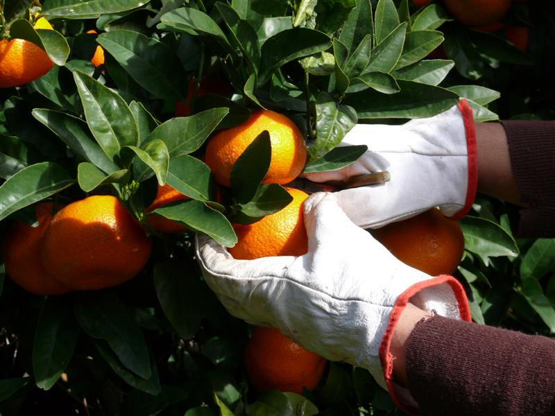 Recolección de cítricos: variedad Nadorcott.